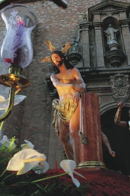 Stmo. Cristo de la Columna a su salida de la parroquia de San Pedro el Jueves Santo. Stmo. Cristo de la Columna de Daimiel, de fondo la puerta del Sol de la parroquia de San Pedro Apóstol.